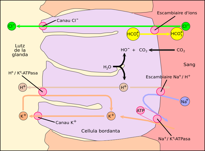 Esquèma generau de foncionament d'una cellula bordanta durant la secrecion d'acid cloridric.